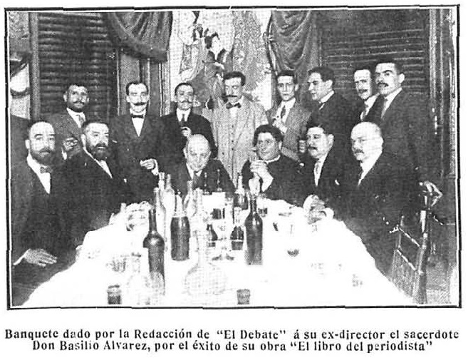 Banquete dado por la redacción de El Debate a su exdirector el sacerdote Basilio Álvarez por el éxito de su obra El libro del periodista.